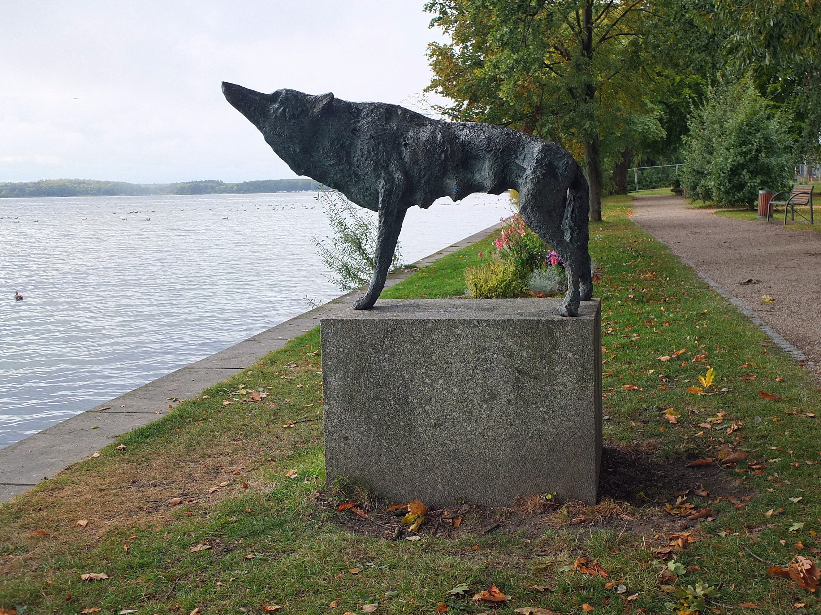 Skulptur Die Wölfin von Walther Preik. Geschaffen im Jahr 1985. Die Skulptur befindet sich in Waren (Müritz) unweit der Kietzstraße am Ufer der Binnenmüritz.